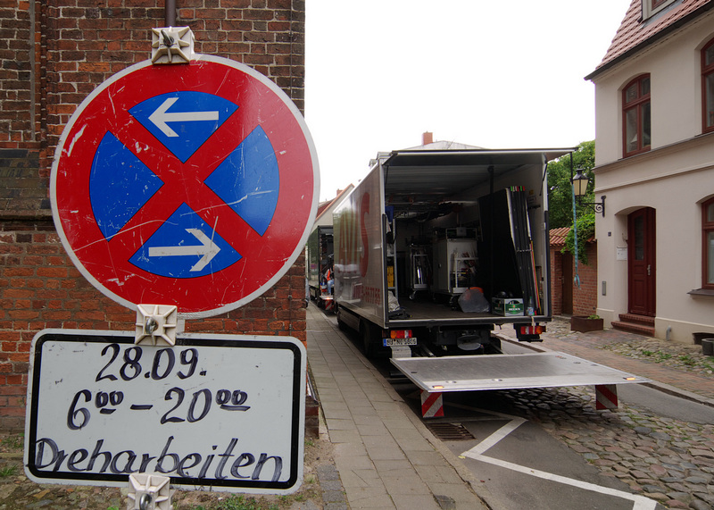 Dreharbeiten für die ZDF-Krimiserie SOKO Wismar an der Nikolaikirche Wismar